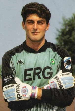 Il portiere della Sampdoria Gianluca Pagliuca Cartolina promozionale 1989 Licensing Pagliuca, Gianluca 1989